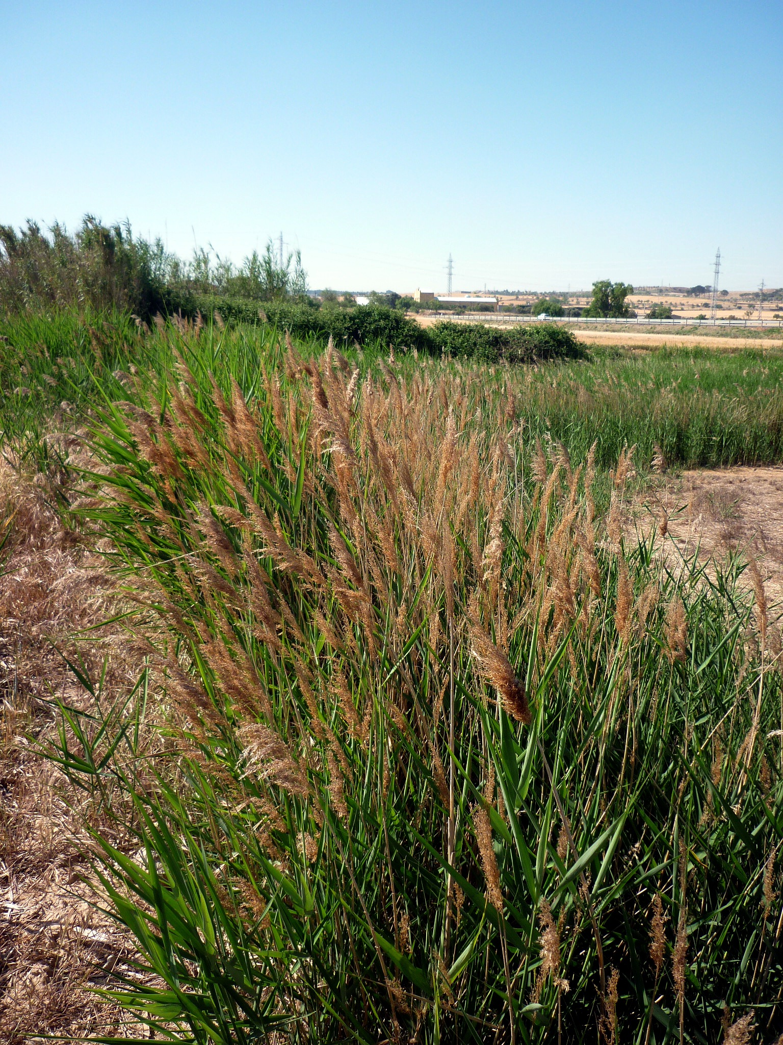 Barranc de Figuerosa (Tàrrega): canya-xiula This is a a photo of a wetland in Catalonia, Spain, with id: IZHC-18003802